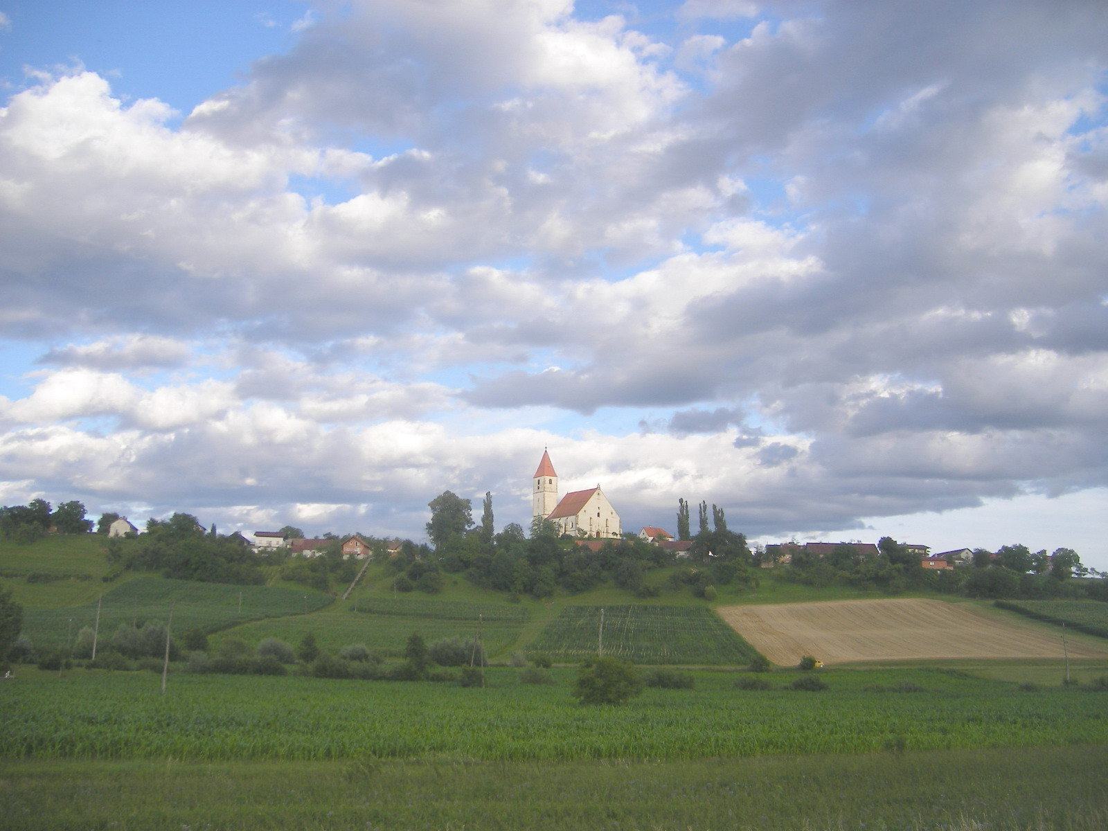 Benedikt